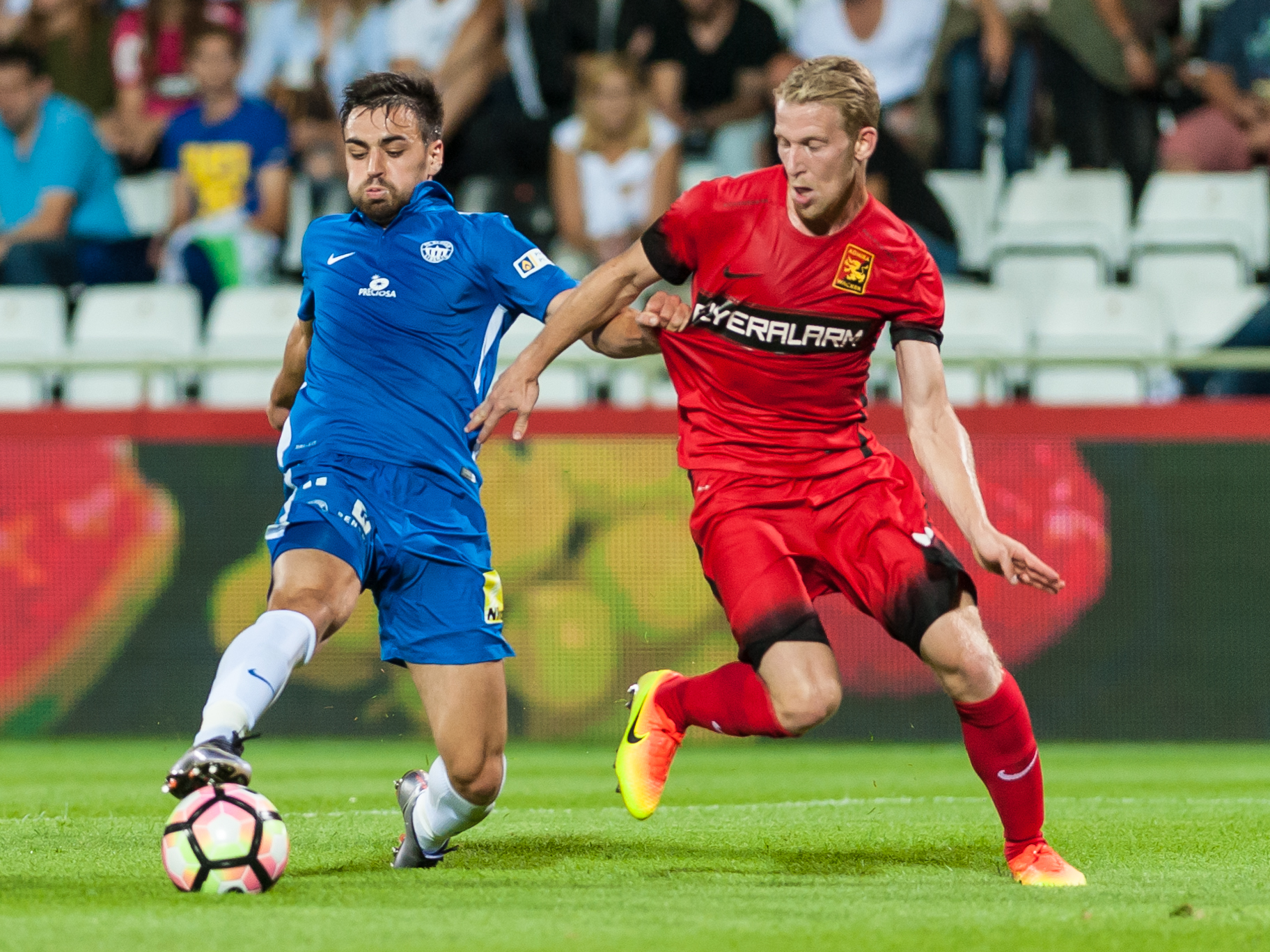 20160728 Europa League - FC Admira Wacker Moedling vs FC Slovan Liberec. Bild zeigt David Hovorka (FC Slovan Liberec) und Thomas Ebner (ADM).